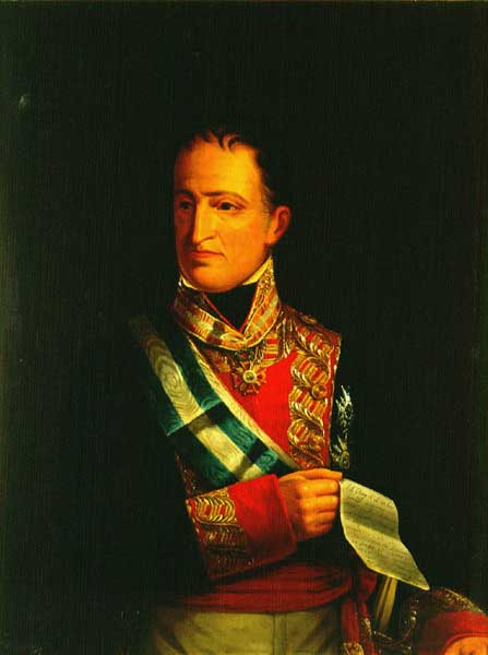 Retrato del almirante español Ángel Laborde y Navarro (1772-1834).